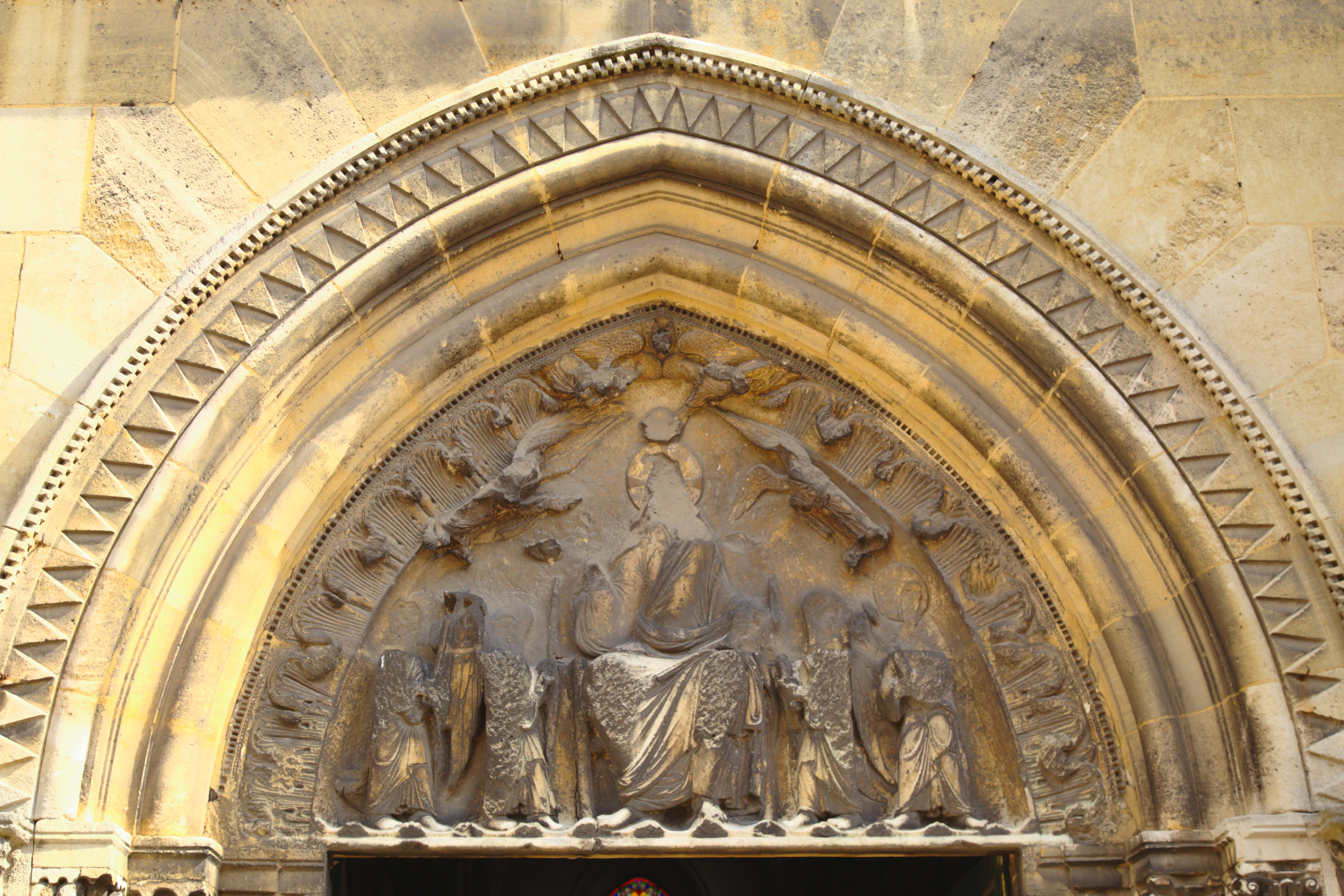 Tymphan de l'église Saint-Hermeland de Bagneux (Hauts-de-Seine)